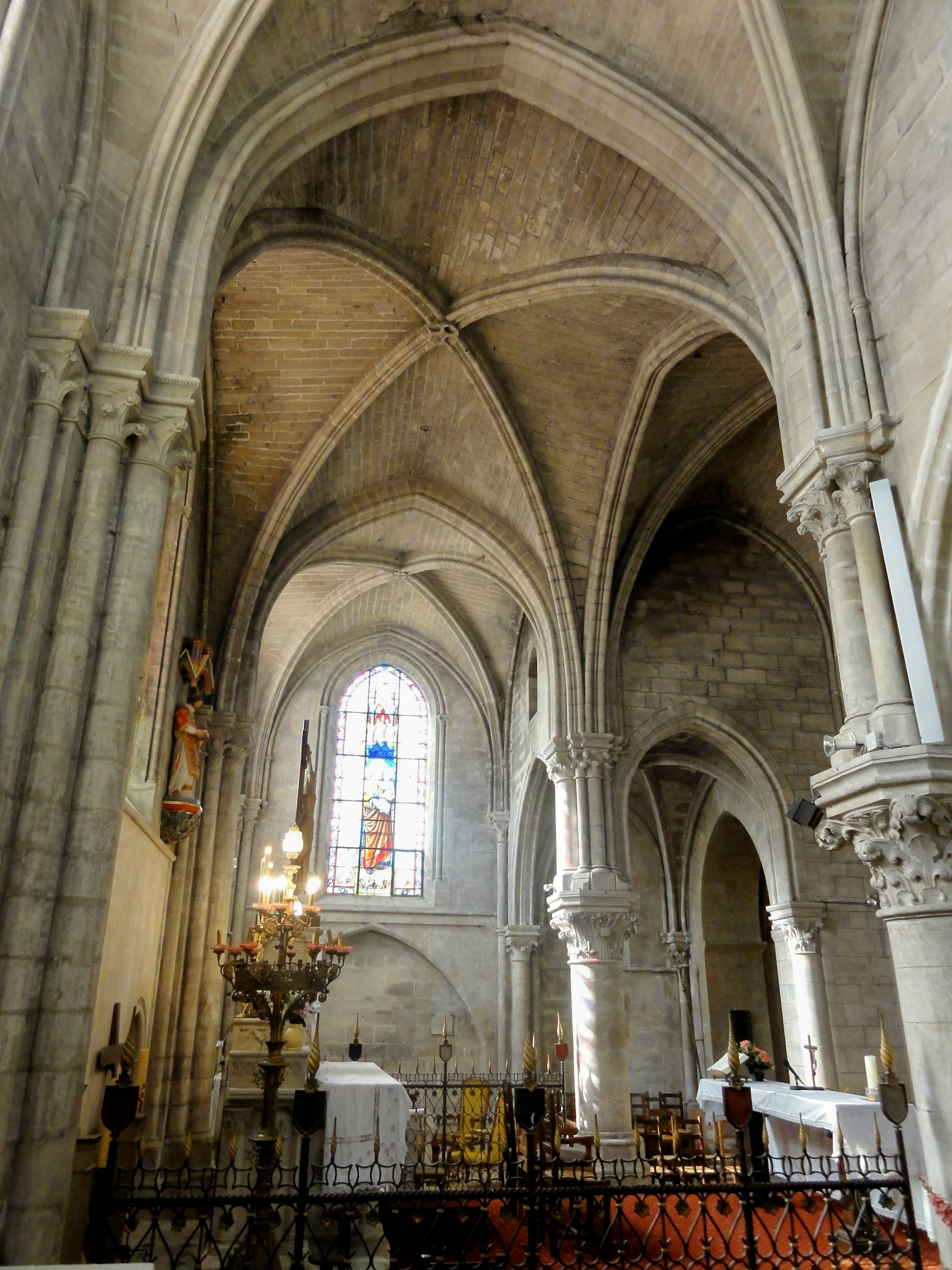 Dernières travées du chœur ; vue du nord au sud.